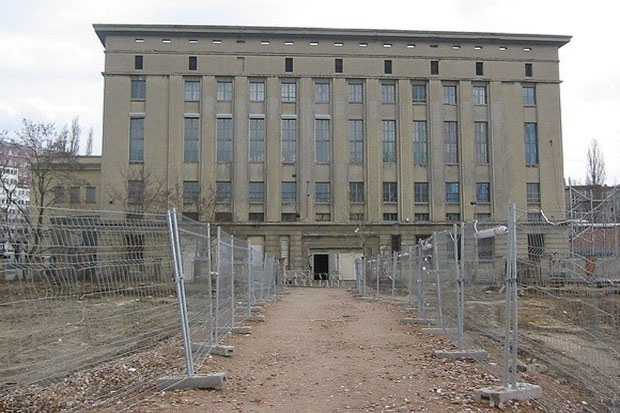 Техно-клуб Berghain фасадная сторона